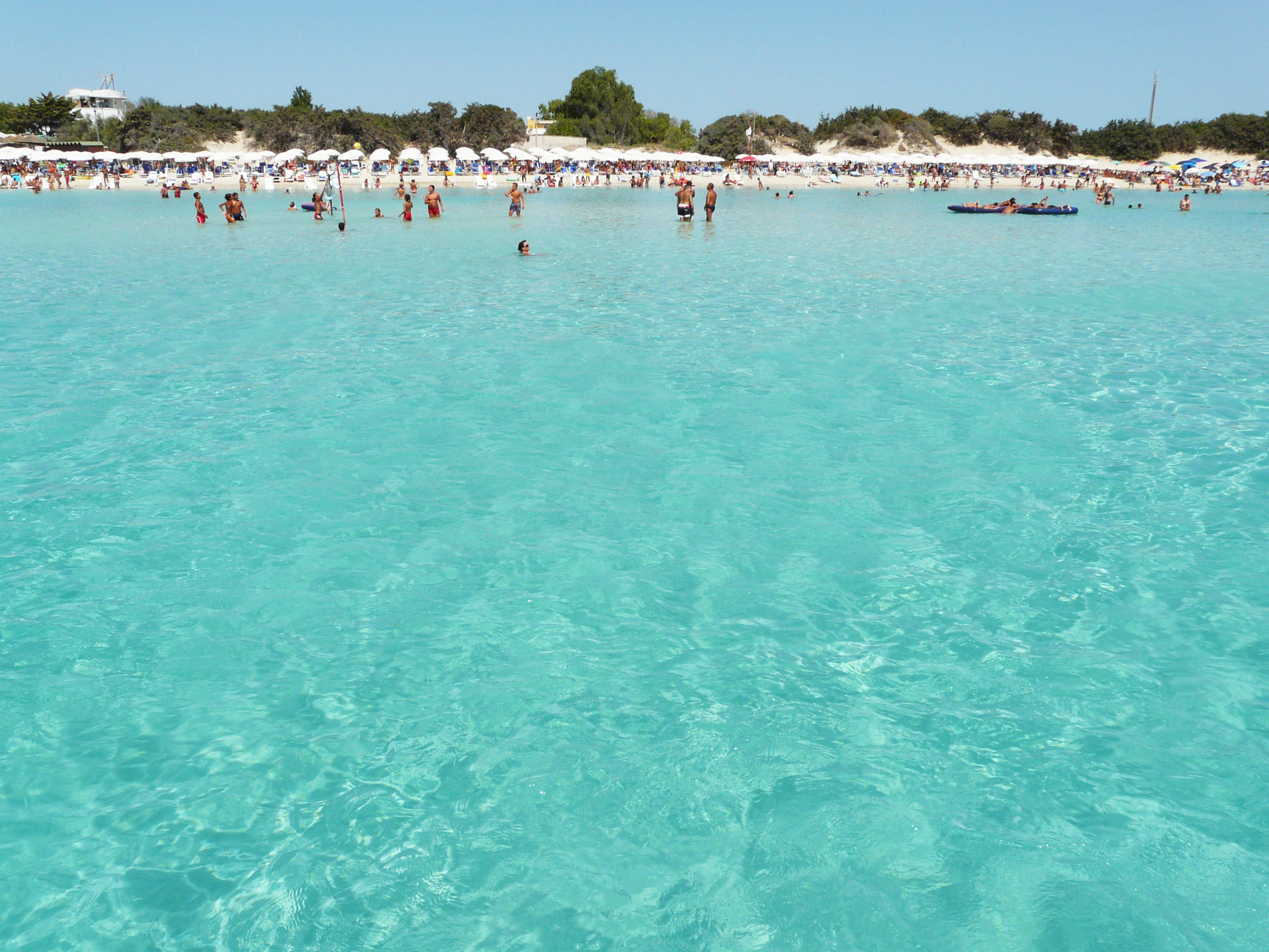 Mare di Porto Cesareo